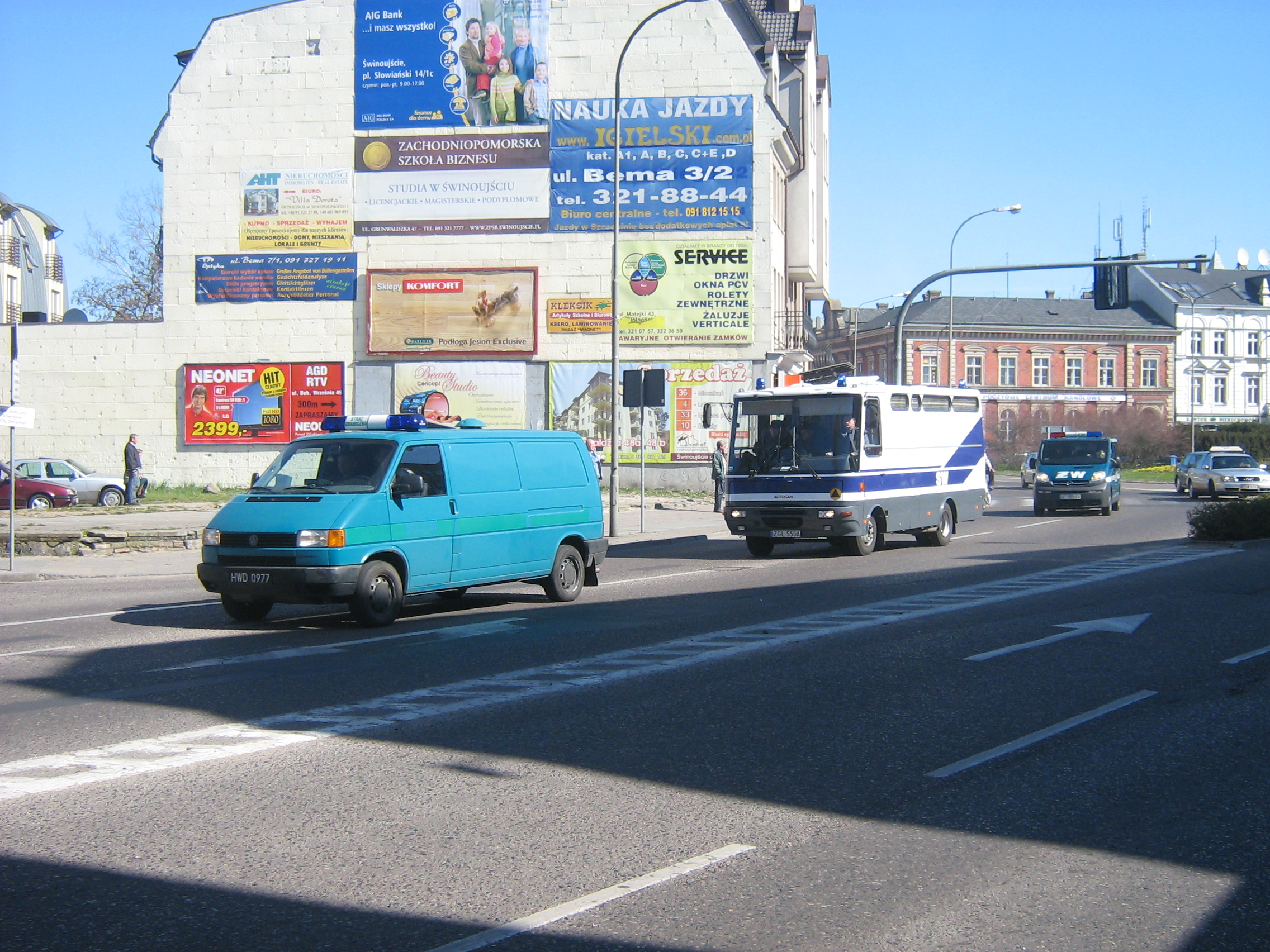 Konwój Straży Więziennej (Autosan H6-10.03), Żandarmerii Wojskowej i Straży Granicznej w Świnoujściu.